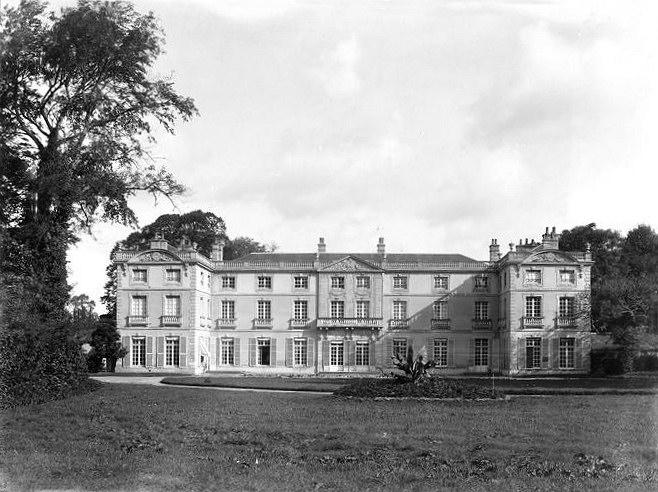 Schloss Vaussieux in Vaux-sur-Seulles, Calvados, Normandie